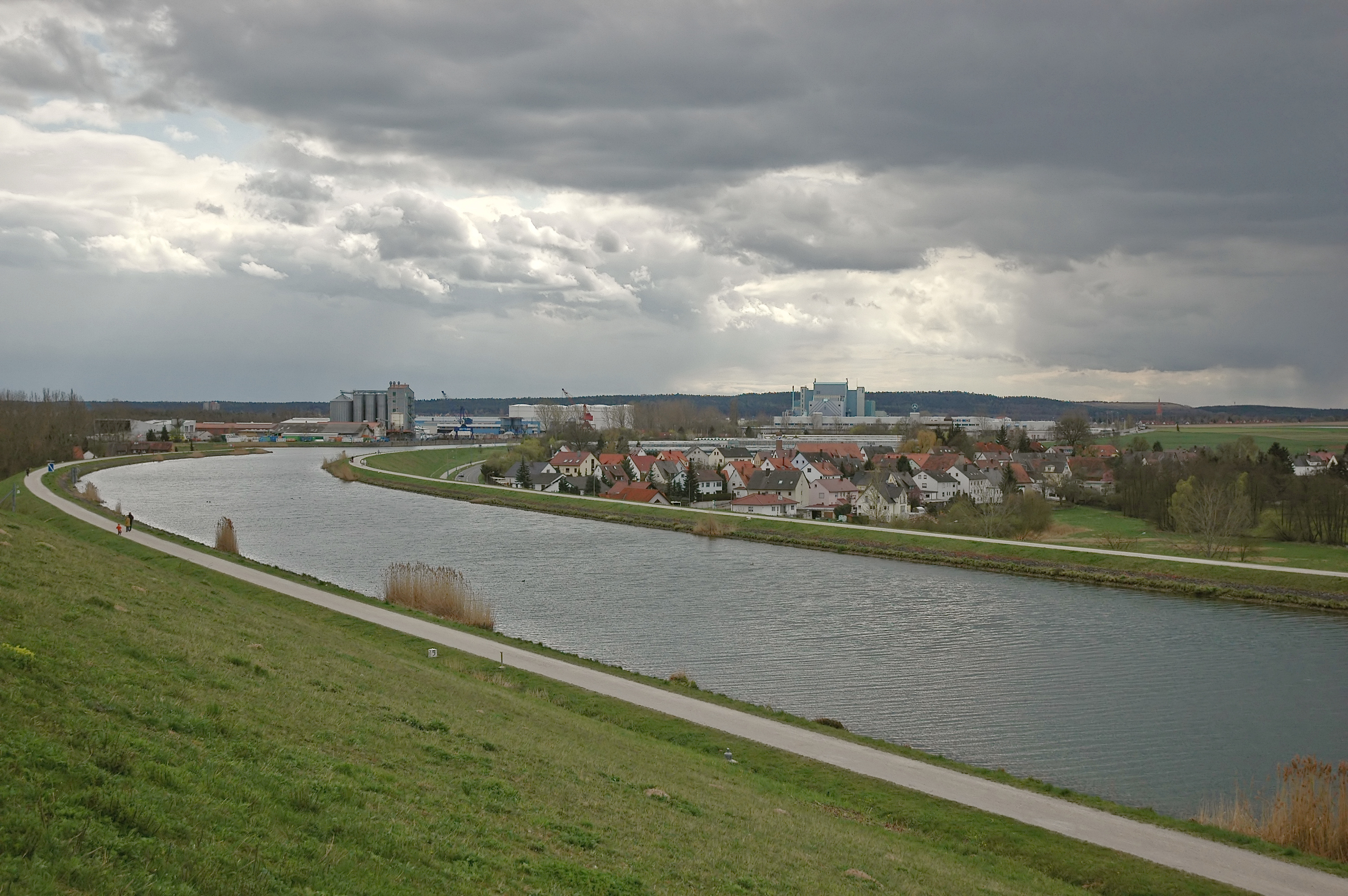 Europakanal bei Fürth